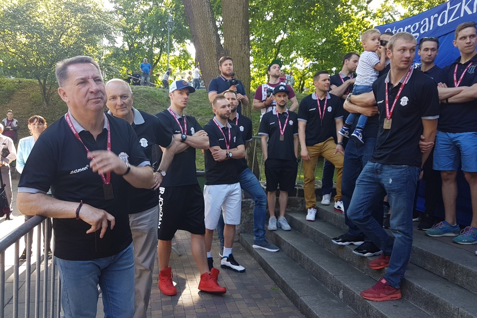 Trener Spójni Krzysztof Koziorowicz (19.05.2018)